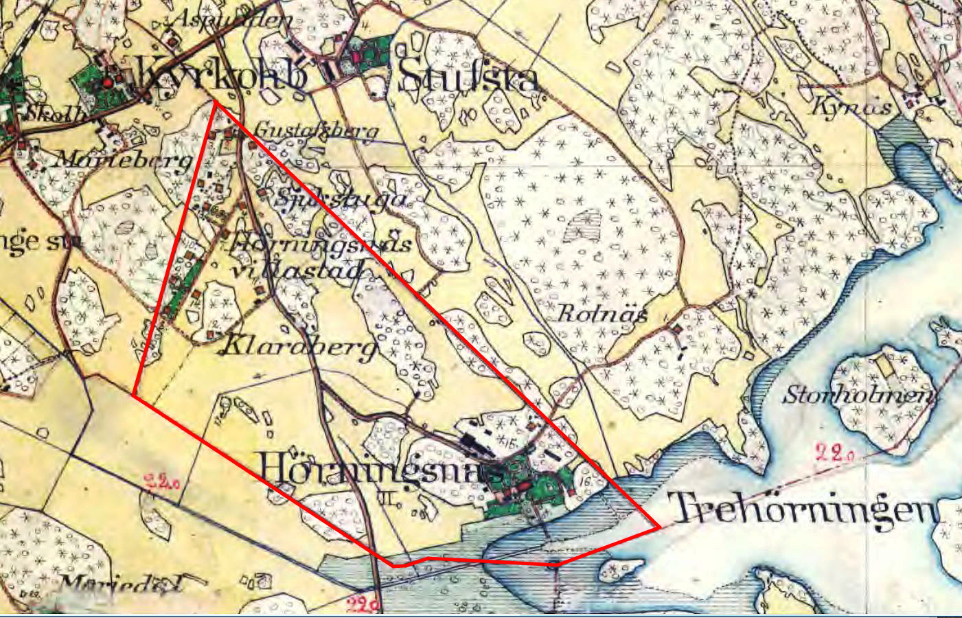 Hörningsnäs gård (nedbränd) låg vid sjön Trehörningen, dagens adress Rotnäsvägen 32